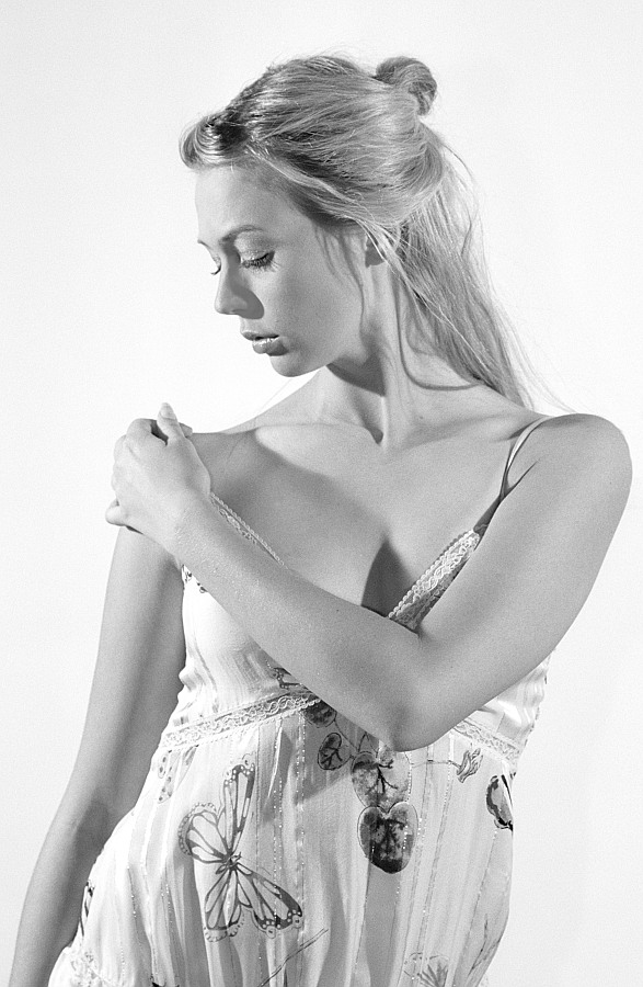 Aline Tausch, eine Teilnehmerin an der dritten Staffel von "Germany's next Topmodel" 2007